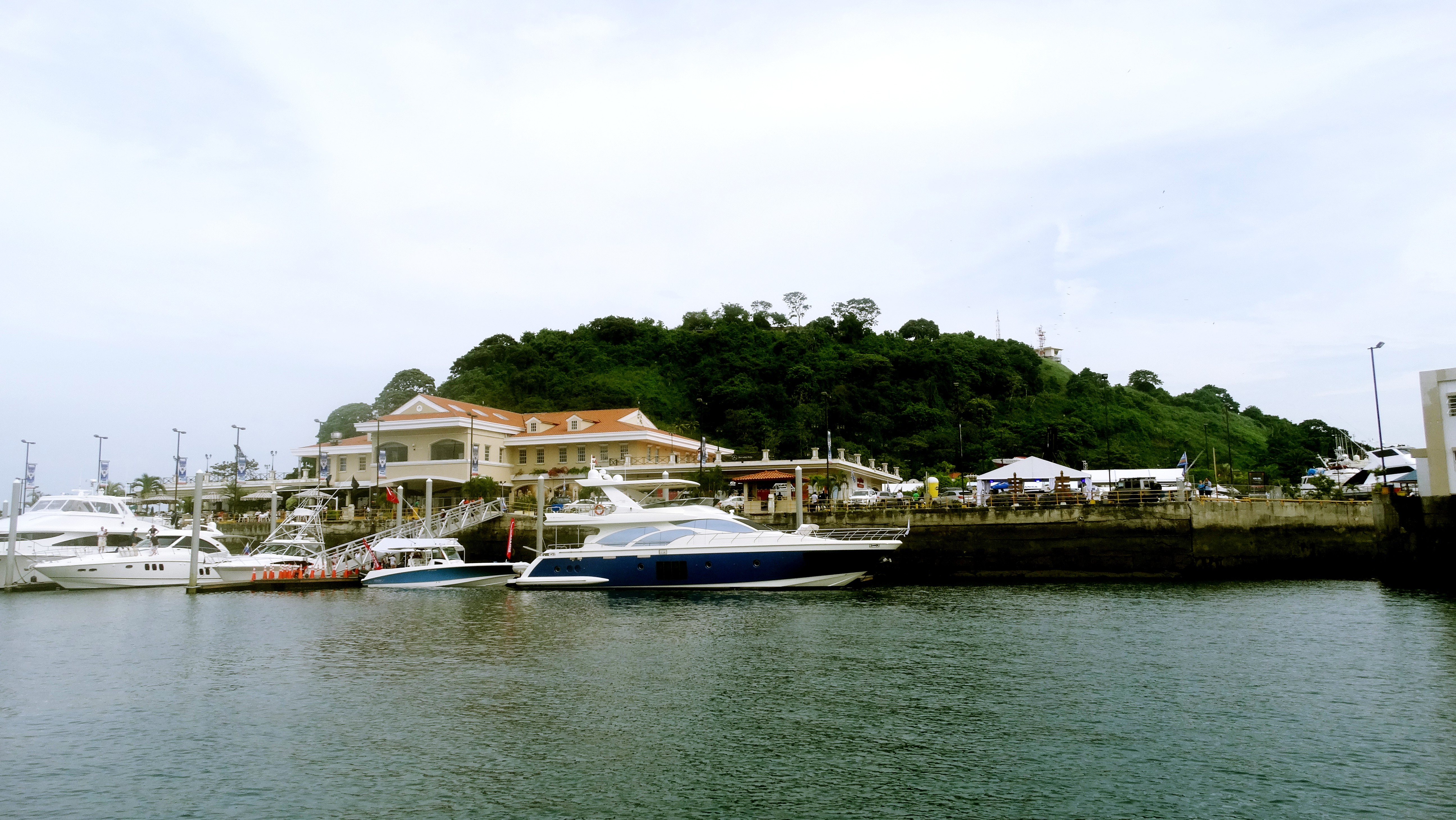 Panama - Panama Yacht Club